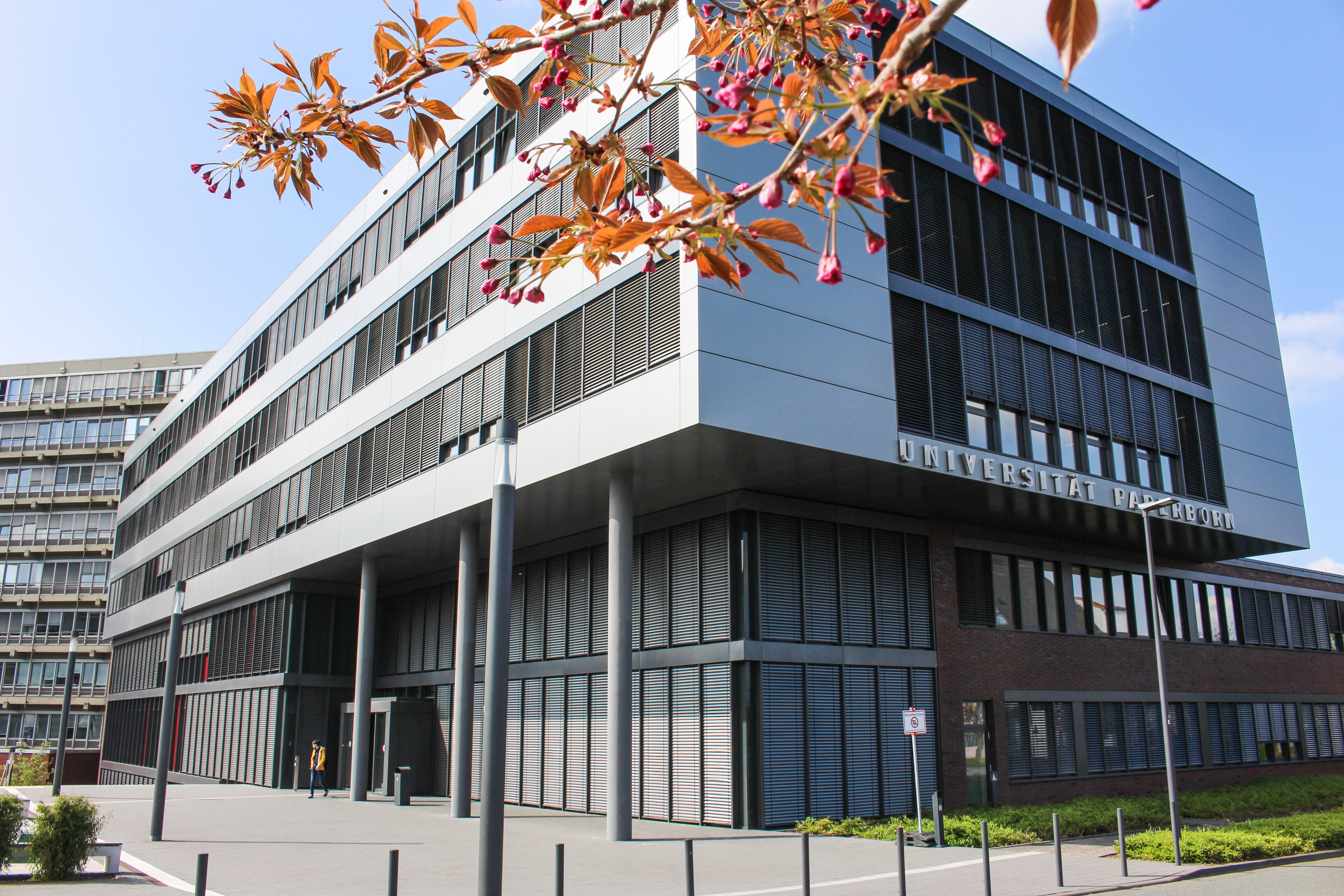 Haupteingang Gebäude Q 2017 Frühling